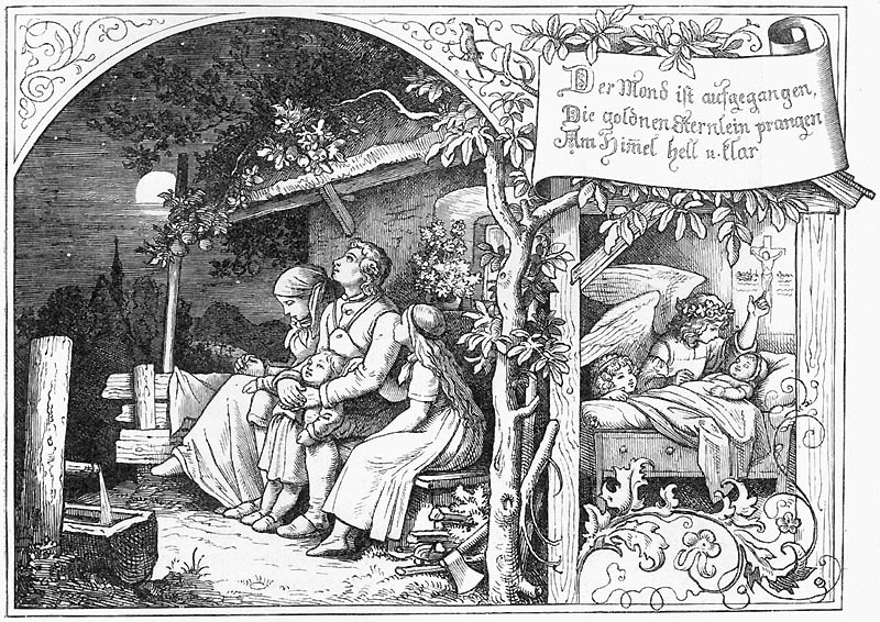 Holzschnitt aus der Vater-Unser-Serie von Ludwig Richter